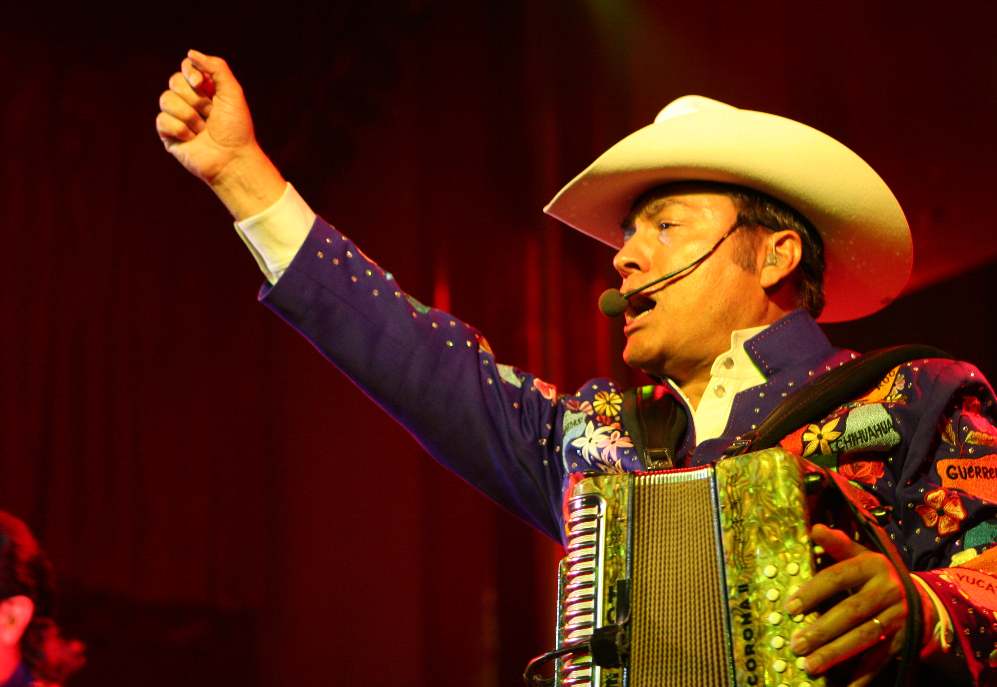 Los Tigres del Norte (Sala Apolo (Barcelona))